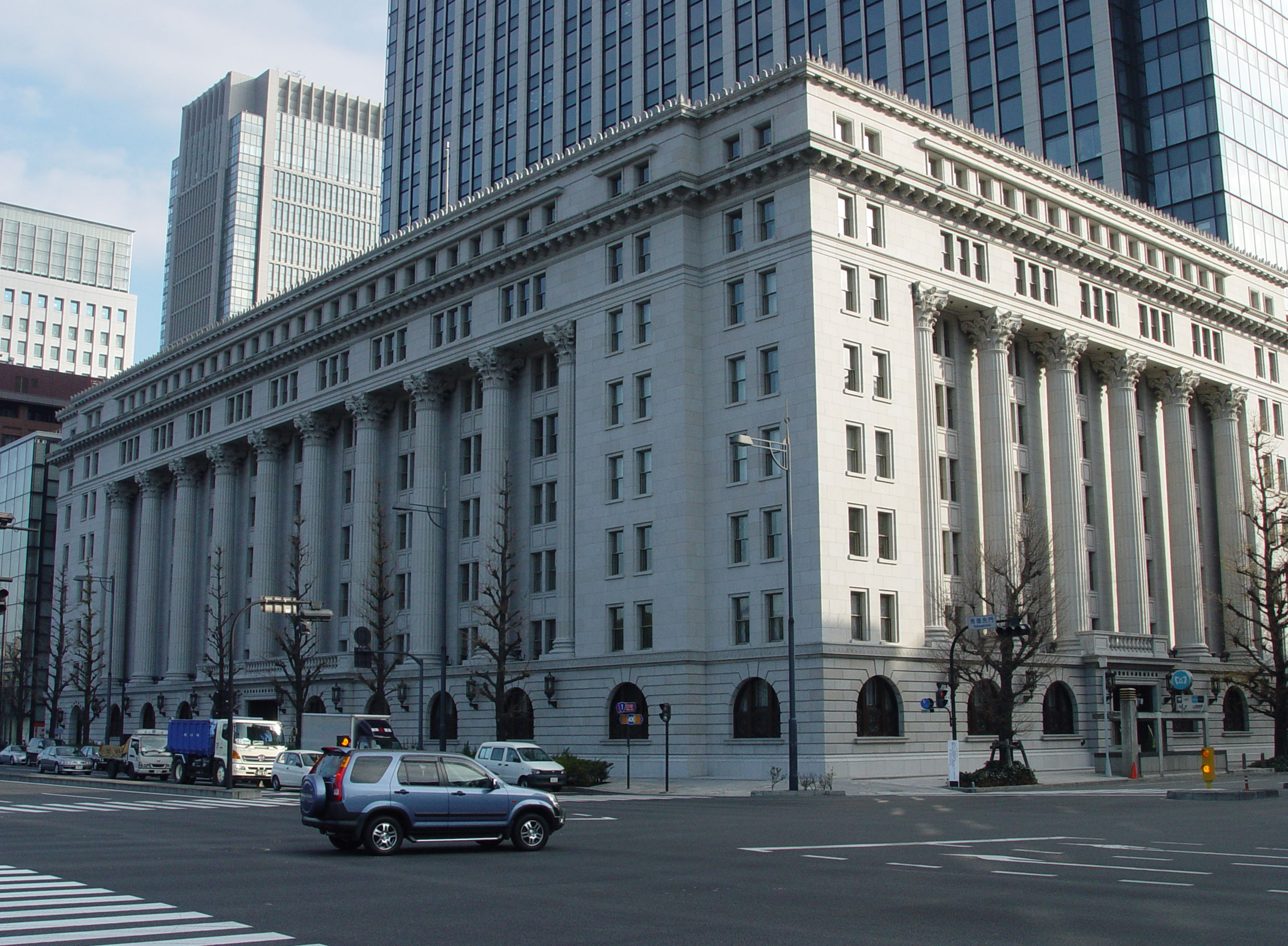 Meijiseimeikan, Tokyo, Japan 明治生命館